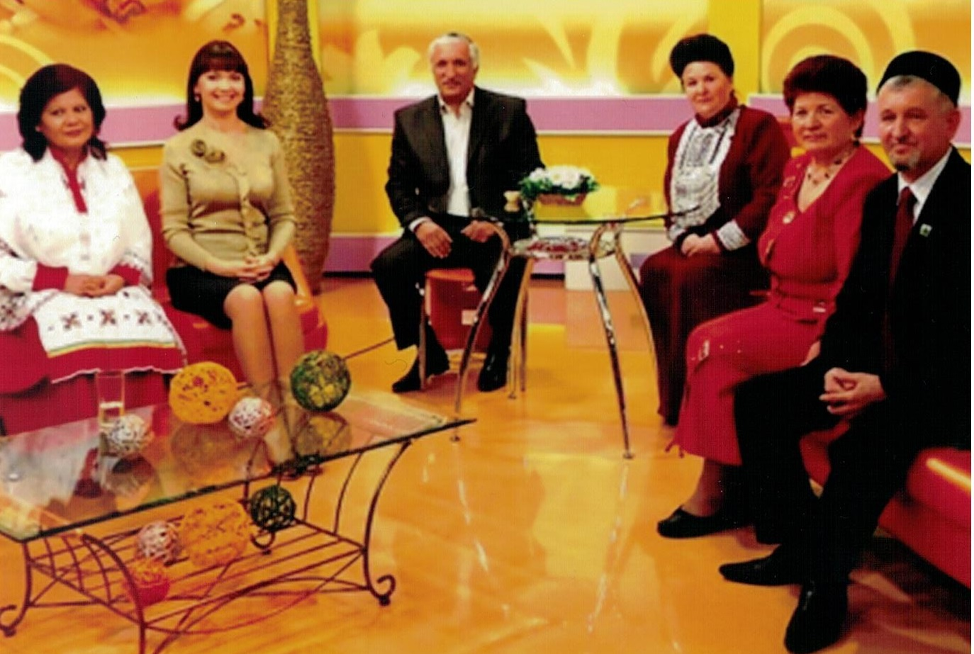 Башҡортостандағы милли ойошмалар етәкселәре БСТ-ла 2010 йыл. Гүзәл Ситдиҡова -Башҡорт ҡатын-ҡыҙҙары йәмғиәте рәйесе